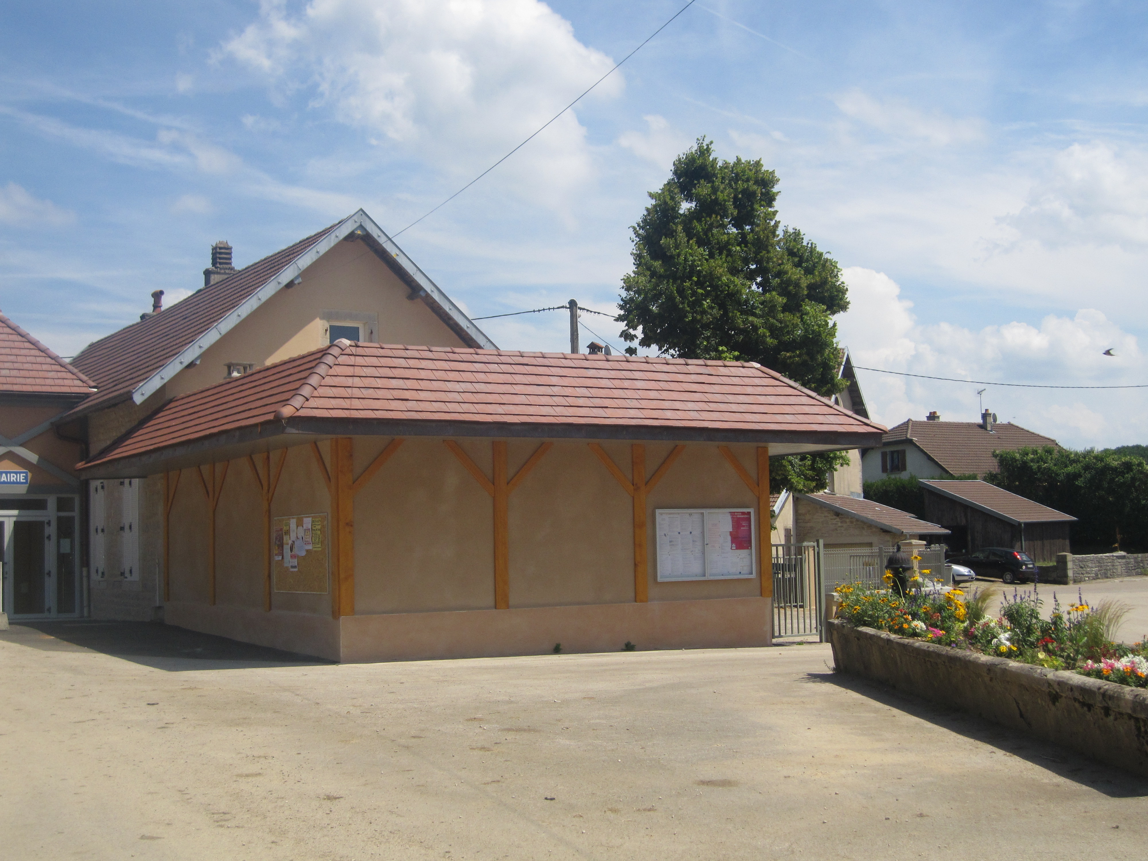 Place de la Mairie